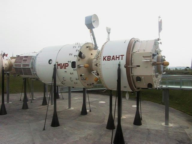 Mir Space Station: full size model at Cité de l'espace, Toulouse